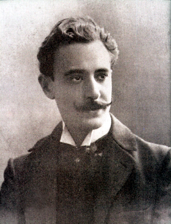 Joaquín Vaamonde Cornide 1872-1900